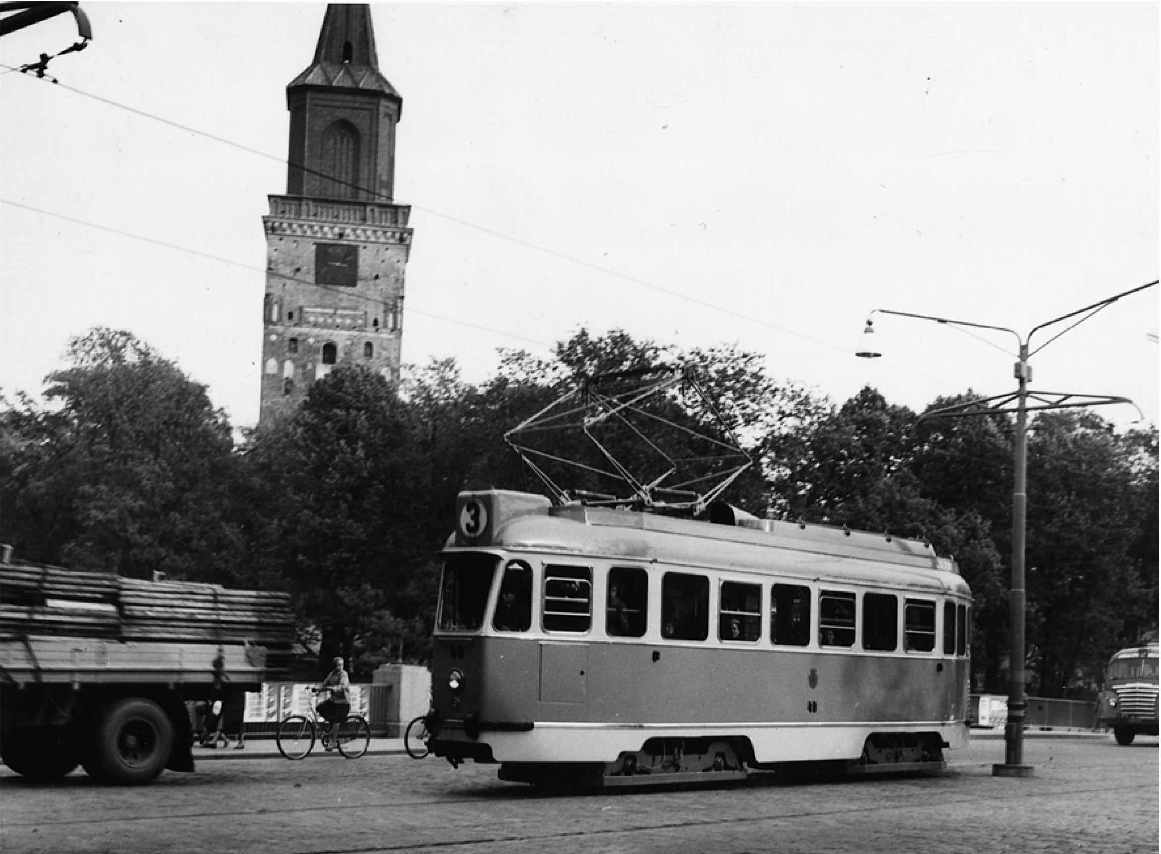 VTS-vaunu o 49 ensimmäistä päivää liikenteessä 20.9.1956. (Turun liikennelaitoksen valokuvakokoelma)